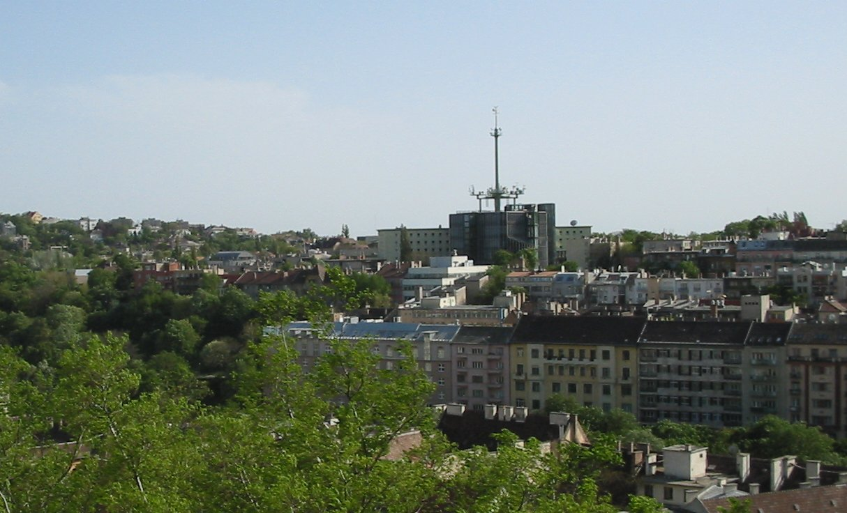 A Magyar Távirati Iroda épülete a Budai Vár felől (Budapest I.)